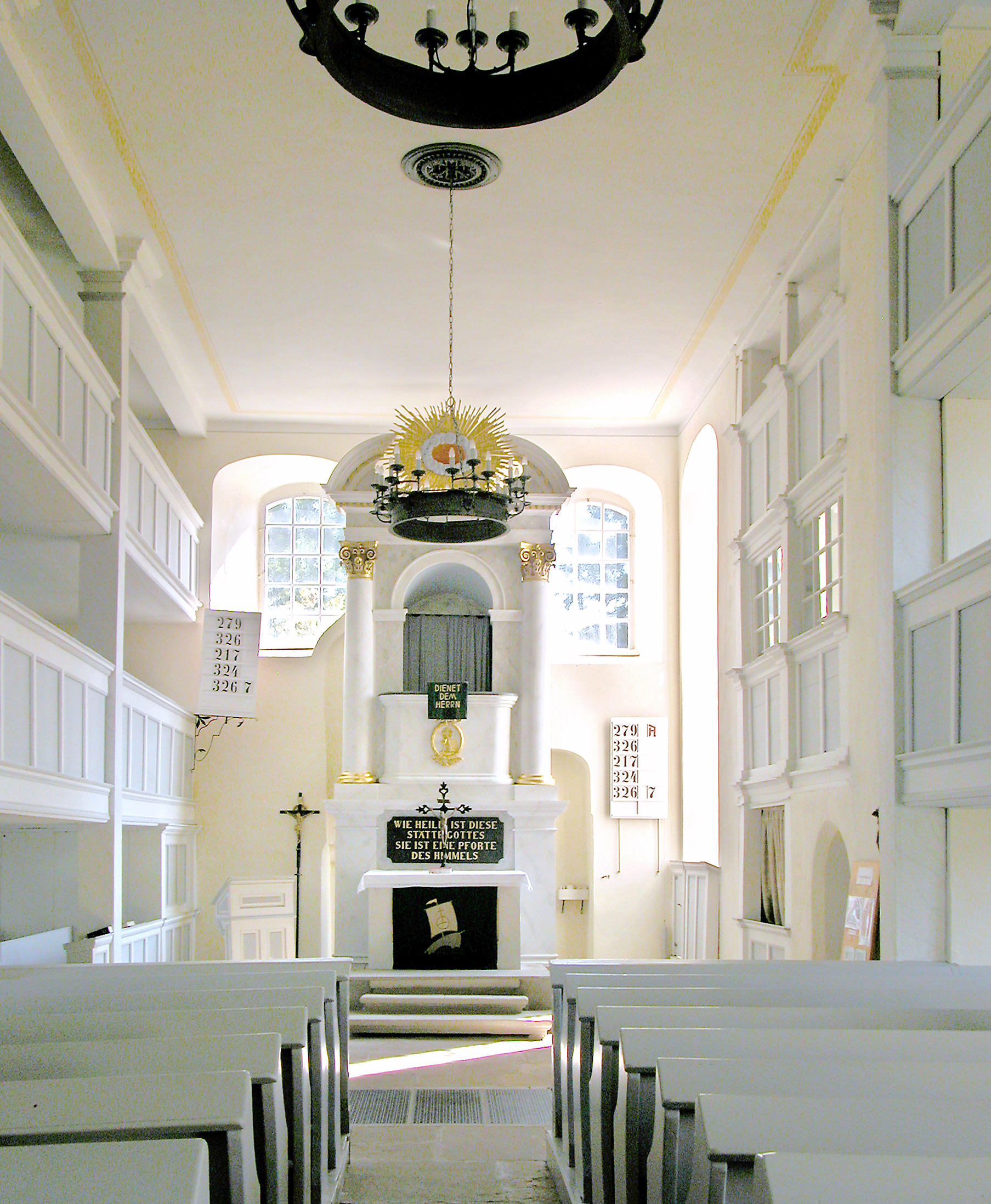 02.09.2011 09600 Niederschöna (Halsbrücke), Schulgasse (GMP: 50.966258,13.422008): St. Annen, Dorfkirche Niederschöna. Vermutlich entstand das erste Kirchengebäude um 1300. Die heutige barocke Saalkirche entstand bei einem Umbau in den Jahren 1754/1755. Die Weihe des heutigen Kanzelaltars erfolgte im Jahr 1828. Er wurde nach einer vom Hofbaumeister Thormeyer gefertigten Zeichnung gebaut, die das Modell einer Mailänder Kanzel zum Vorbild hatte. Dadurch bezeichnet man ihn auch als "Mailänder Altar". [DSCNn2650.TIF]20110902025DR.JPG(c)Blobelt